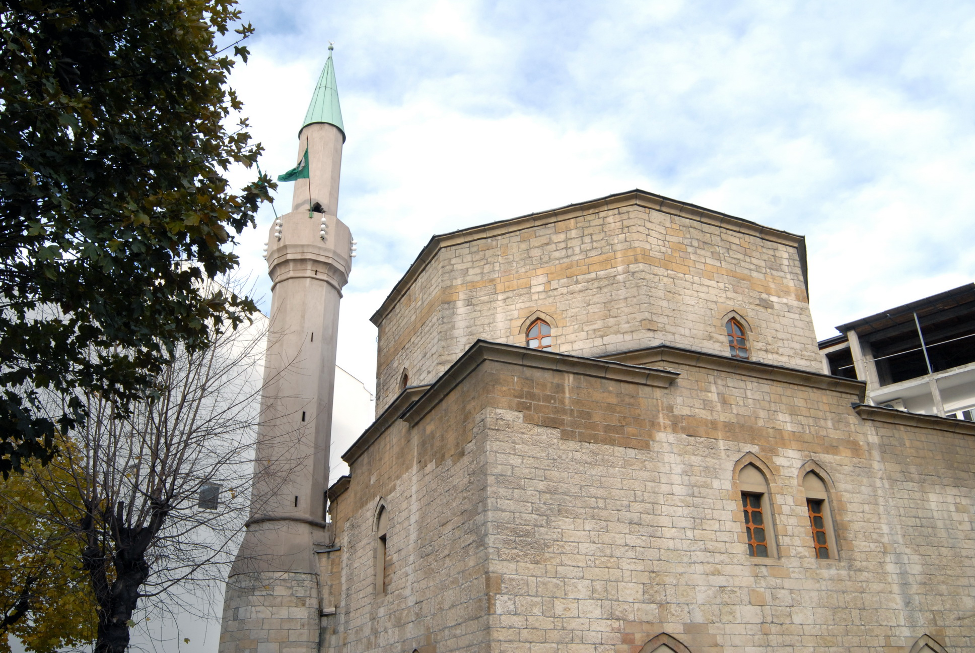 Autor by Snežana Negovanović